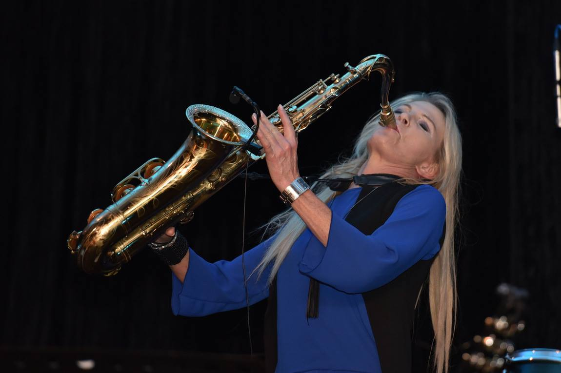 Maria Kofler On Stage